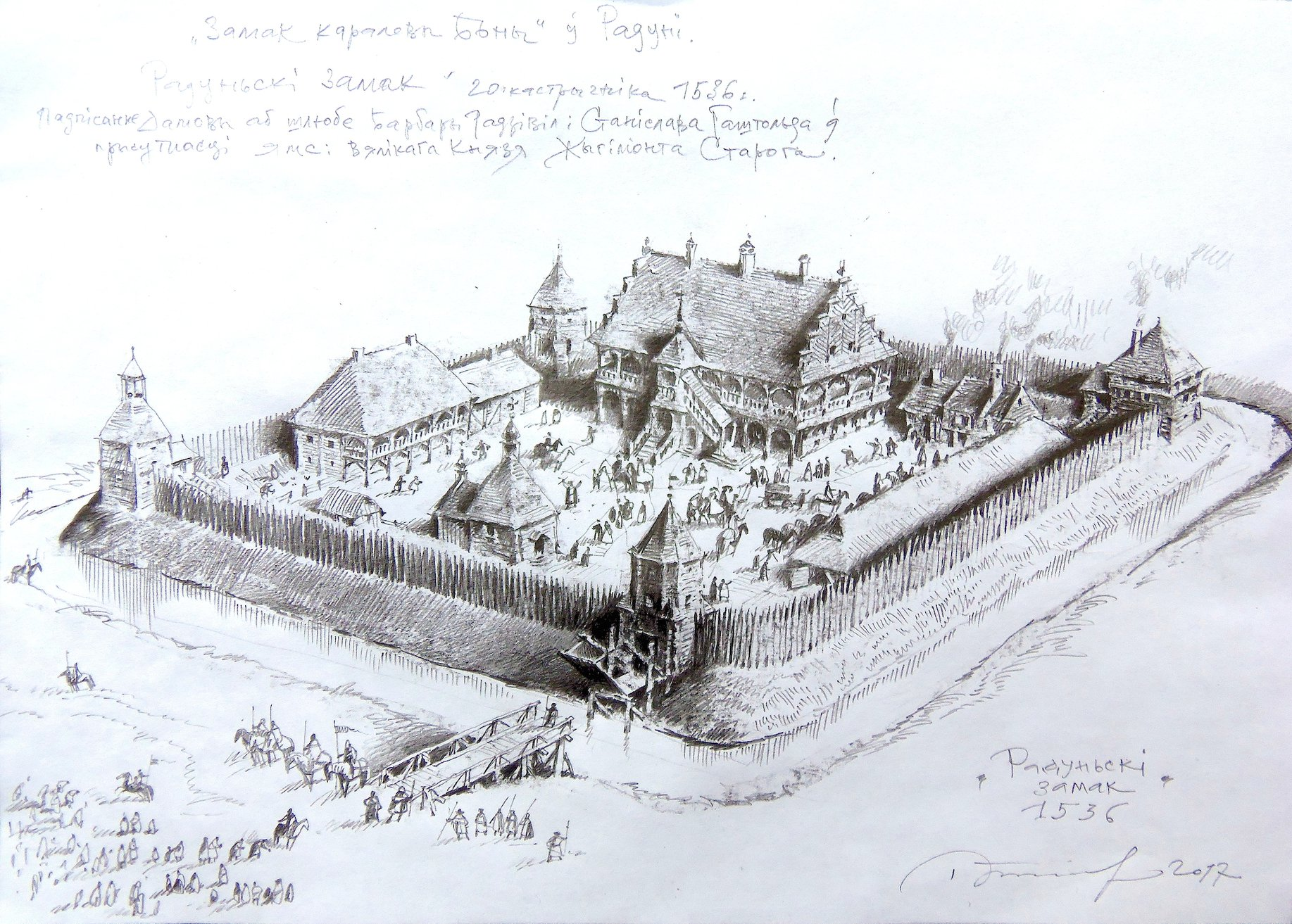 "Замэчак каралевы Боны". Замак ў Радуні, 20 кастрычніка 1536 г. (Падпісанне Дамовы аб шлюбе Барбары Радзівіл і Станіслава Гаштольда ў прысутнасці Вялікага князя Жыгімонта Аўгуста).